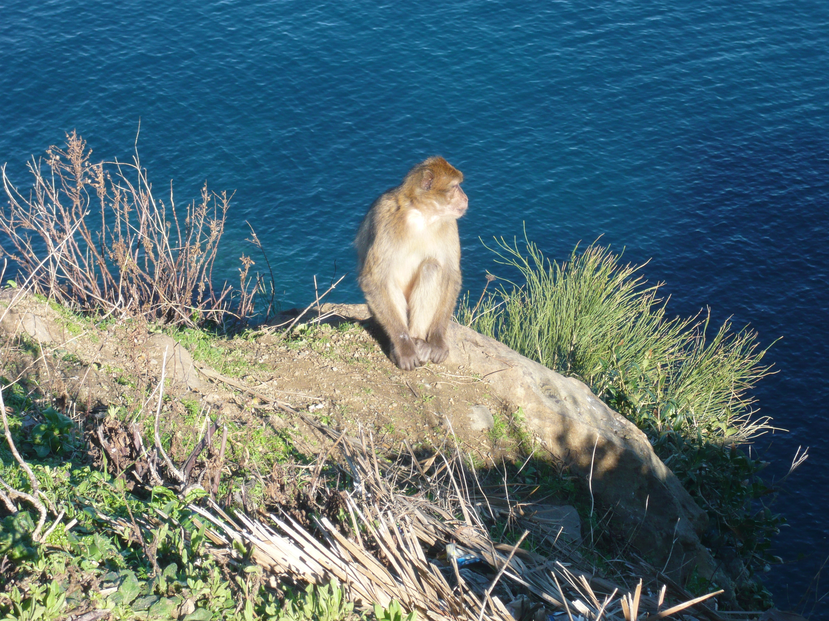 Macaque berbère sur un rocher à Tazza - Ziama Mansouriah (Algérie)